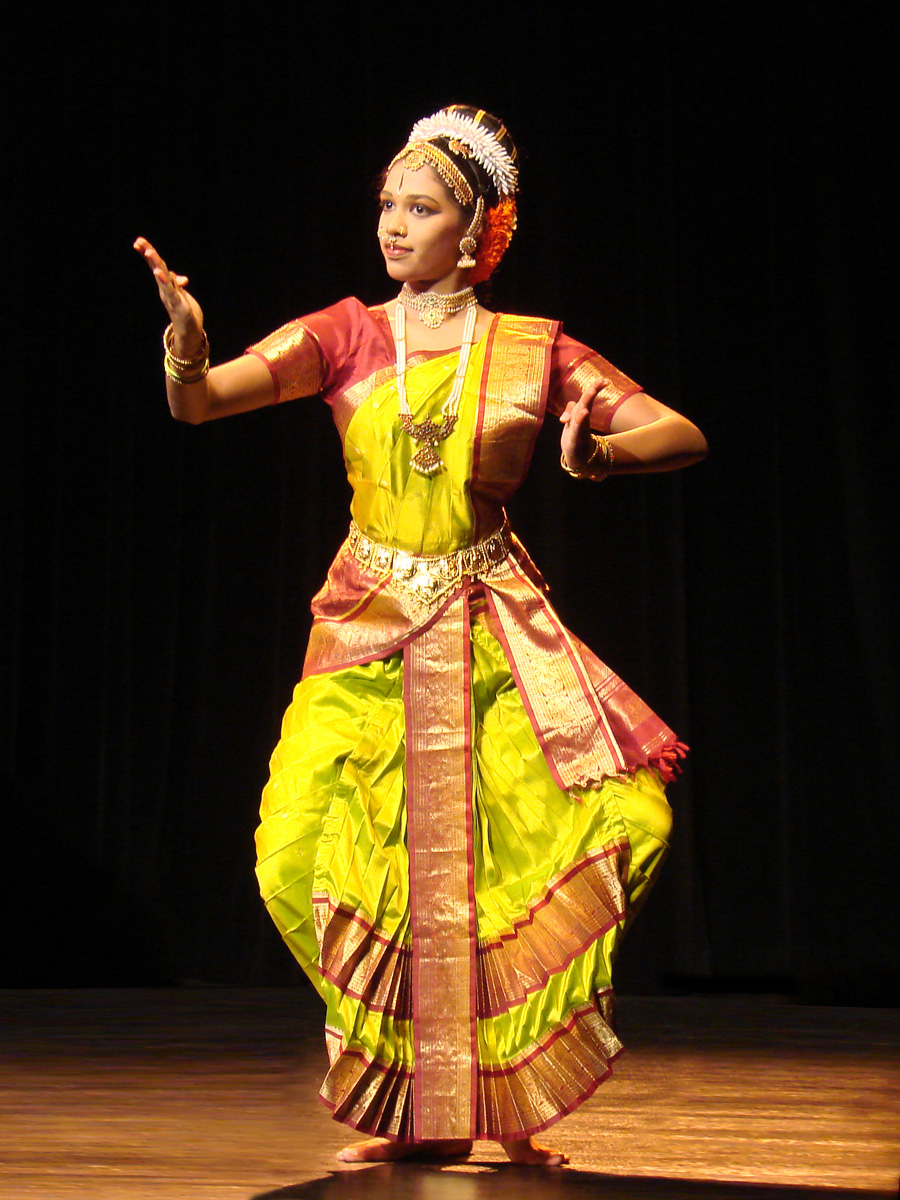 Spectacle de danse Kuchipudi, organisé par le service de l'auditorium du musée Guimet en coproduction avec Triveni, présenté le samedi 19 avril 2008, dans l'auditorium du musée Guimet à Paris par : "Deepika Reddy et ses musiciens" Sur la photo, Pooja Reddy, une des danseuses de Deepika Reddy appartenant à Deepanjali, l'institution qu'elle a fondée en Inde et qui est dédiée à l’excellence de la pratique du Kuchipudi.